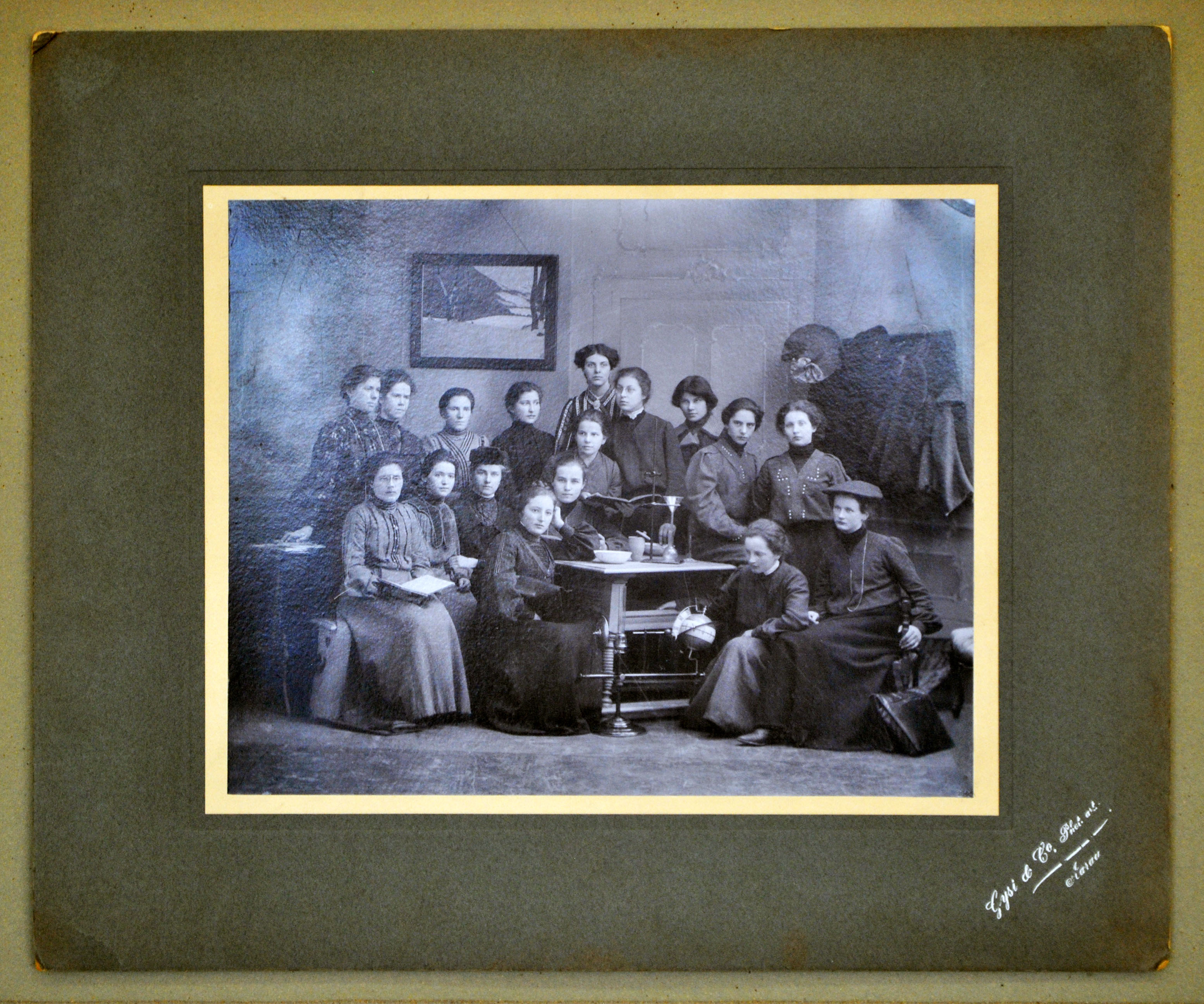 Folgende Schülerinnen sind (laut Inschrift auf der Rückseite der Foto) auf diesem Bild zu erkennen: Emilie Blattner, Johanna Frey, Martha Fricker, Alwine Härdi; Martha Holliger, Matilde Jehle, Ida Käppeli, Marie Läubli, Mina Merk, Margareta Saxer, Martha Schüepp, Frida Steiner, Hanna Suter, Martha Trüb, Alice Wirz, Ida Zumsteg